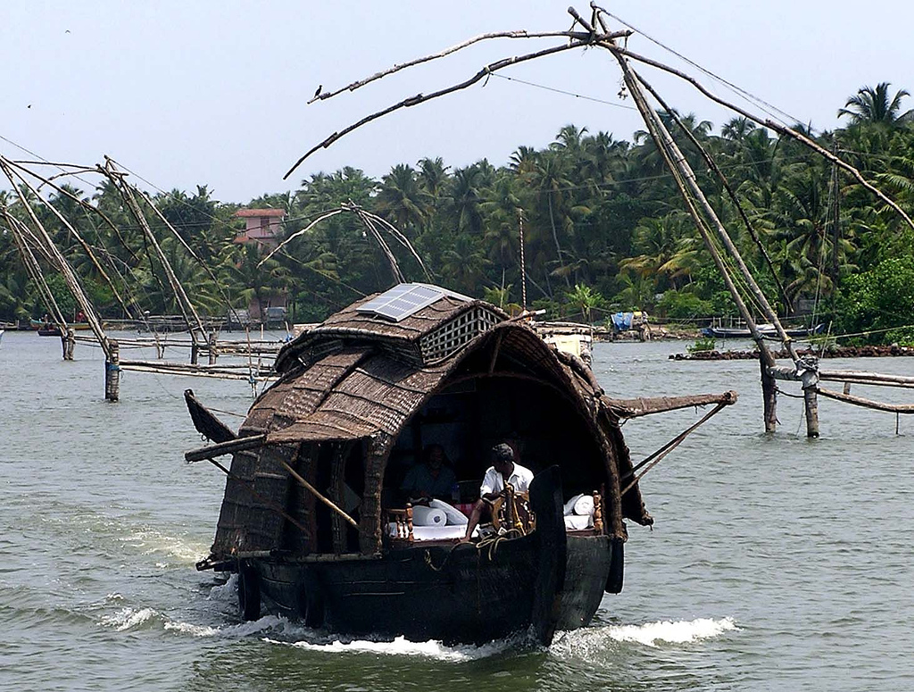 Kollam til Alappuzha